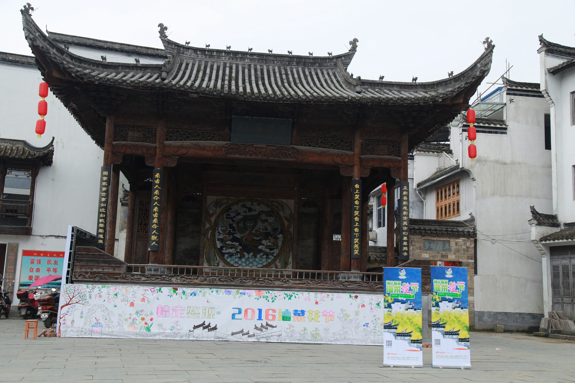 婺源江湾古戏台